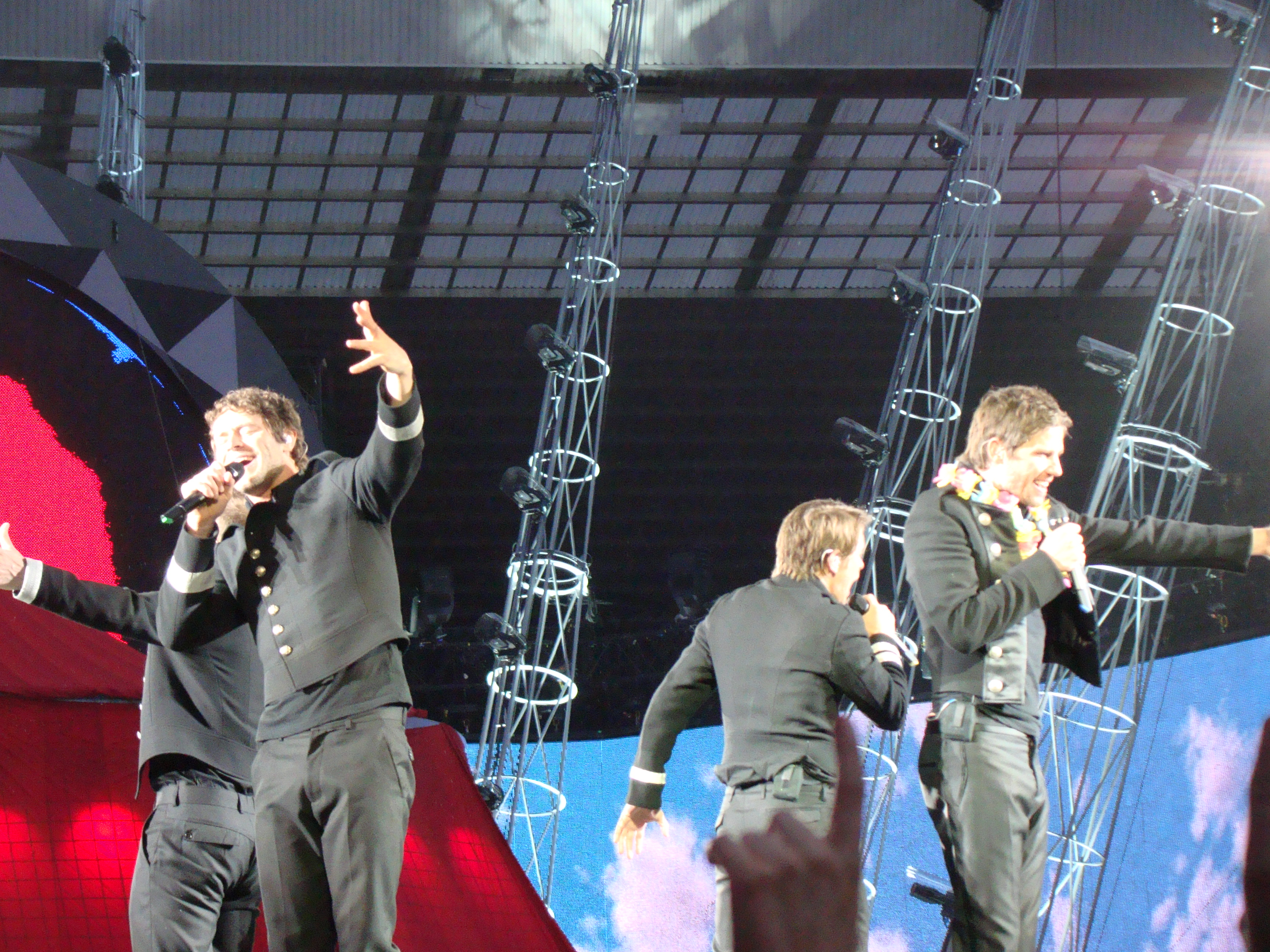 Take That